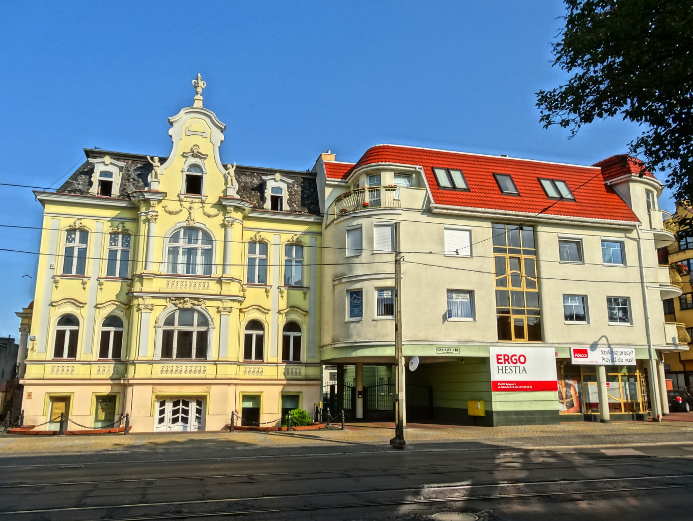 Ulica Gdańska w Bydgoszczy na odcinku od ul. Chocimskiej do ul. Kamiennej